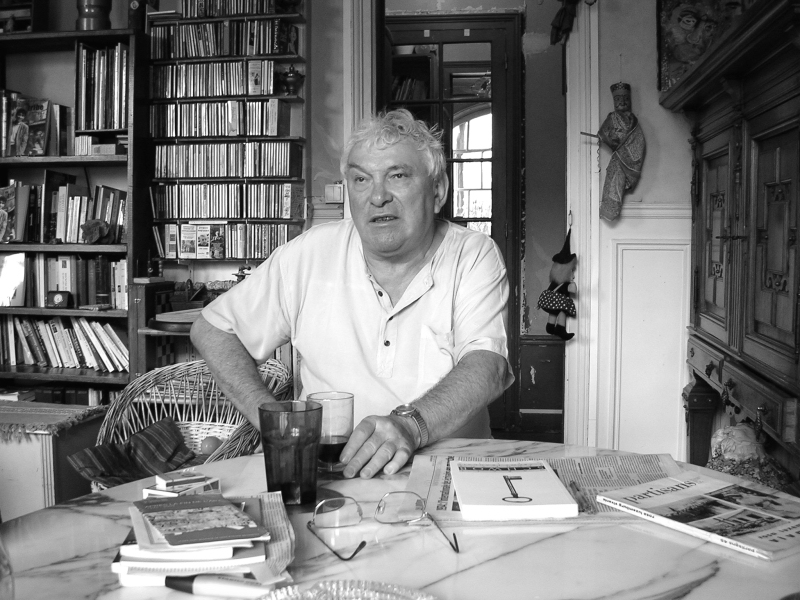 Jean-Michel Mension dit Alexis Violet (en pensant)